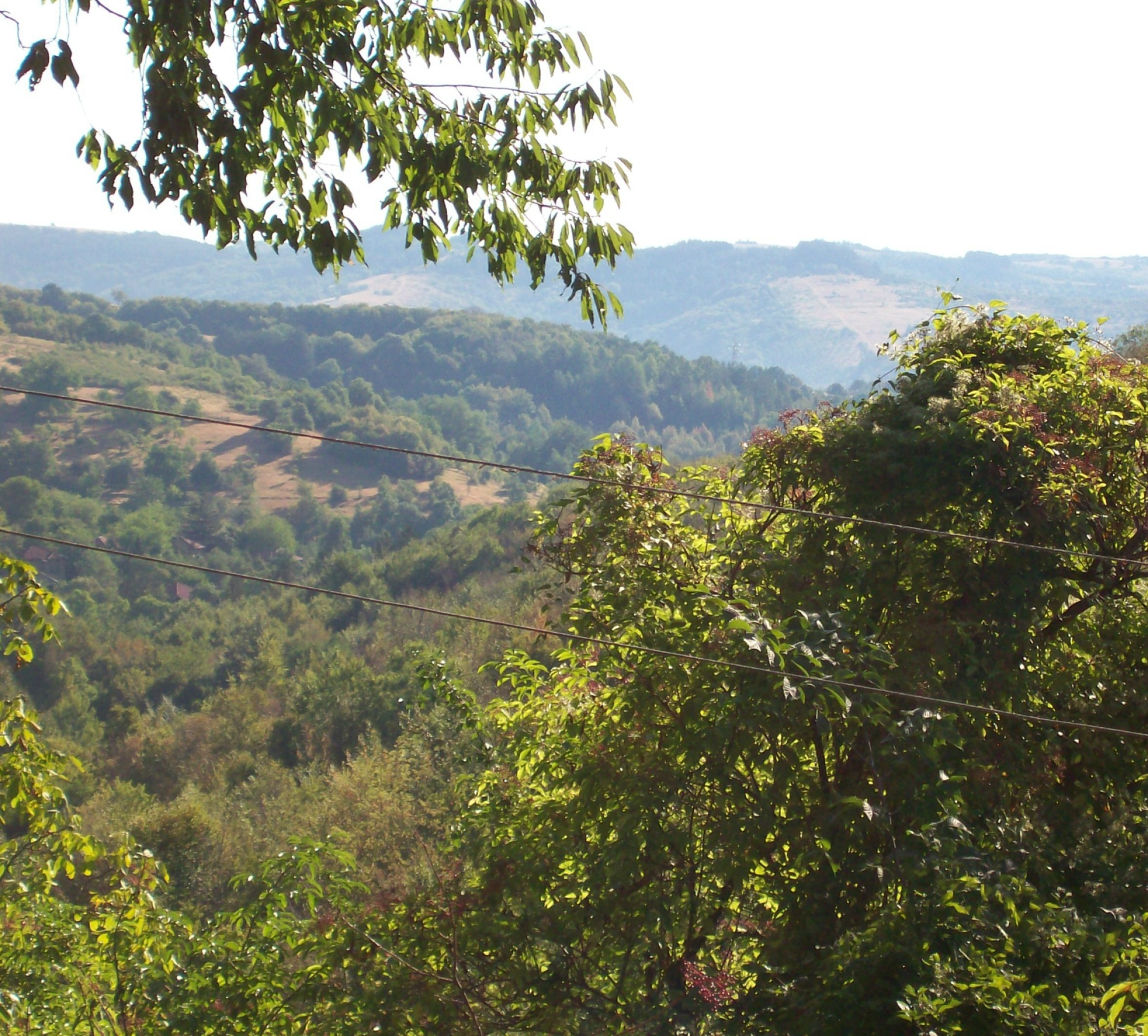 Над село Носеите